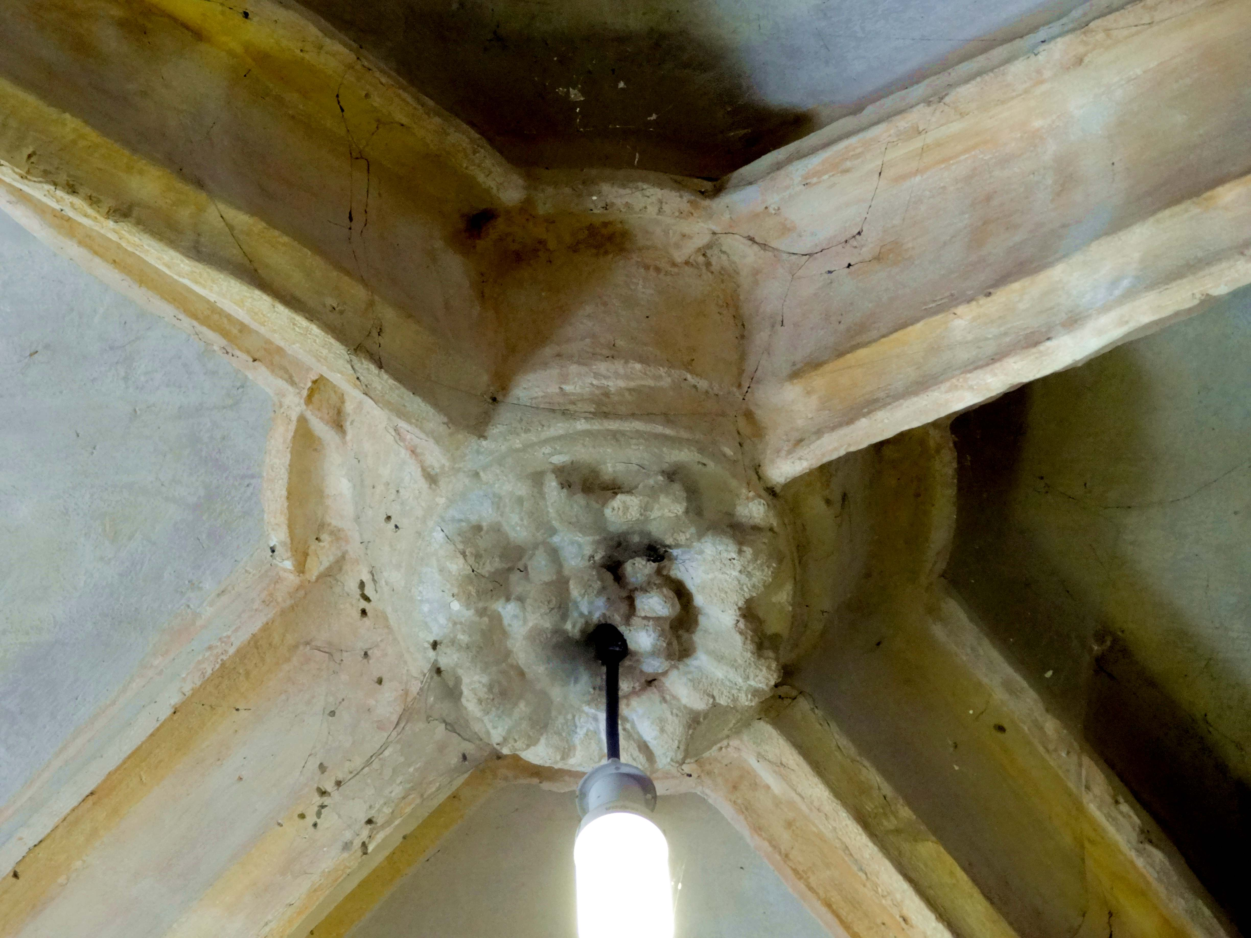 Intérieur de l'église - voir titre.